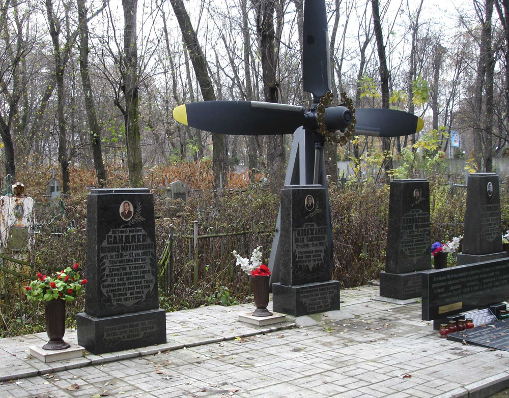 Соломенское кладбище. Мемориал летчиков, погибших в 1957 г.